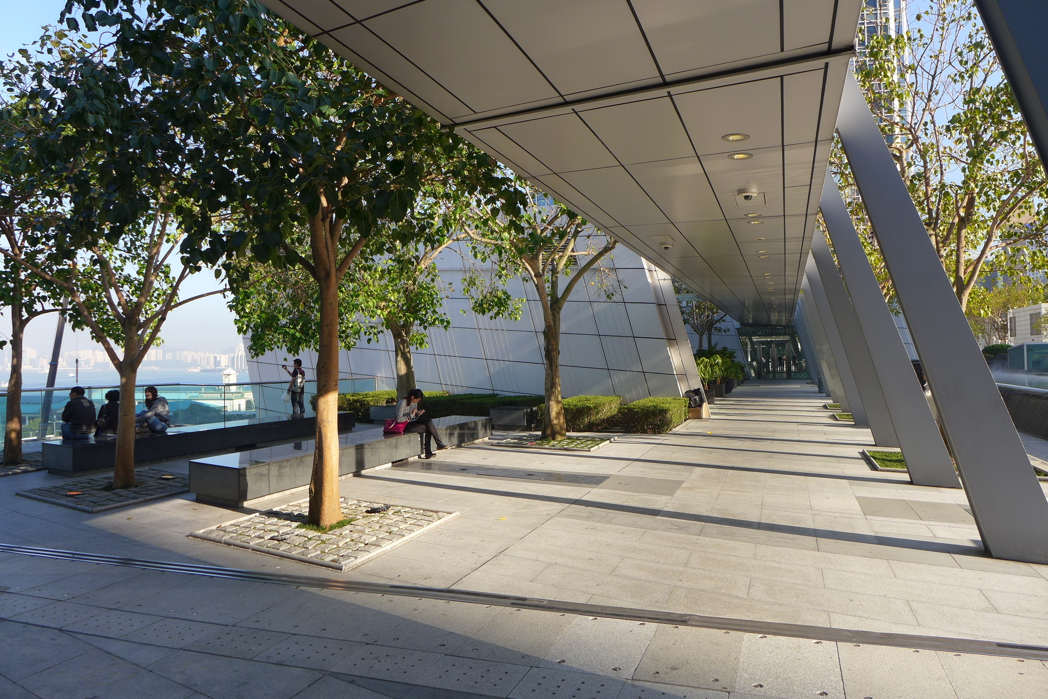 ifc mall Level 4 Garden view